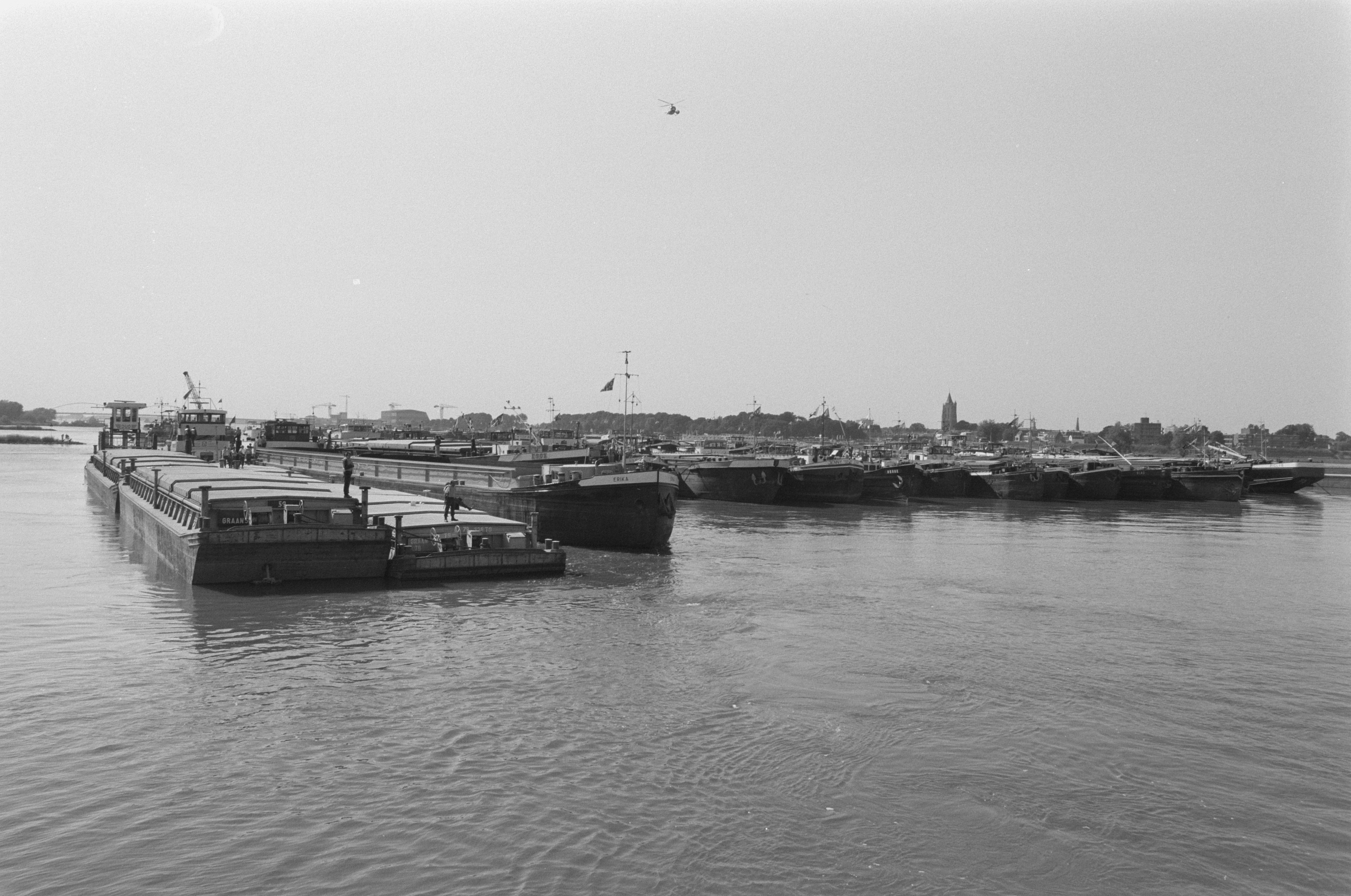 Collectie / Archief : Fotocollectie Anefo Reportage / Serie : [ onbekend ] Beschrijving : Blokkade binnenvaartschippers op Merwede bij Gorinchem/Woudrichem tegen duwbakken vann Granaria Datum : 14 juni 1988 Locatie : Merwede Trefwoorden : Blokkades, duwbakken Persoonsnaam : Granaria Fotograaf : Bogaerts, Rob / Anefo Auteursrechthebbende : Nationaal Archief Materiaalsoort : Negatief (zwart/wit) Nummer archiefinventaris : bekijk toegang 2.24.01.05 Bestanddeelnummer : 934-2654